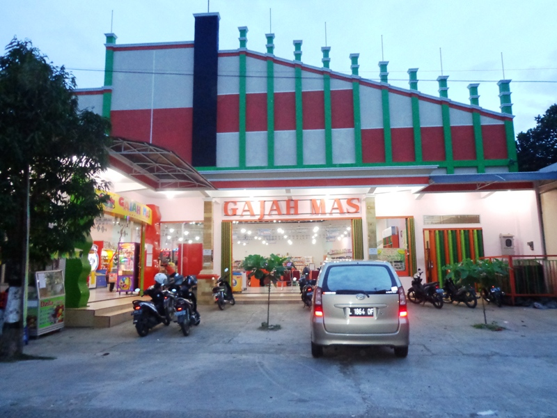 Gajah Mas Centre